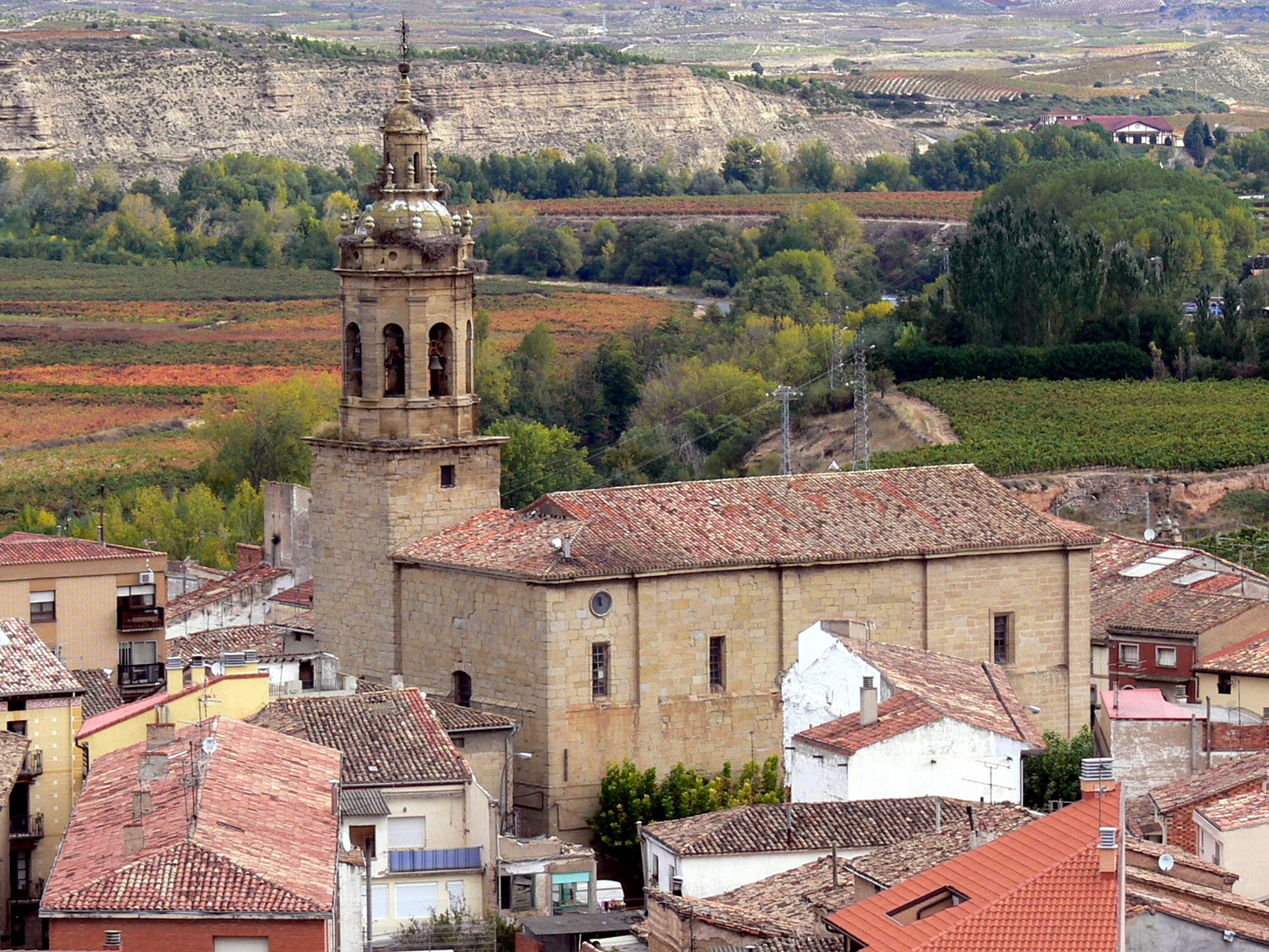 Iglesia de San Martín en Cenicero, La Rioja - España.